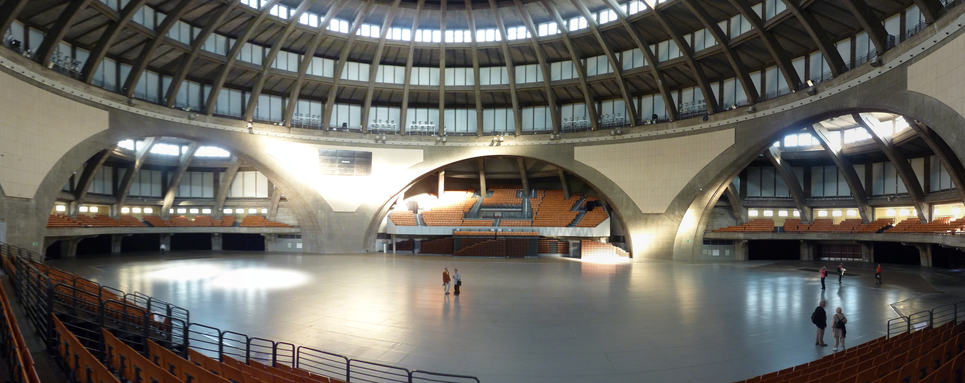 Wnętrze Hali Stulecia we Wrocławiu